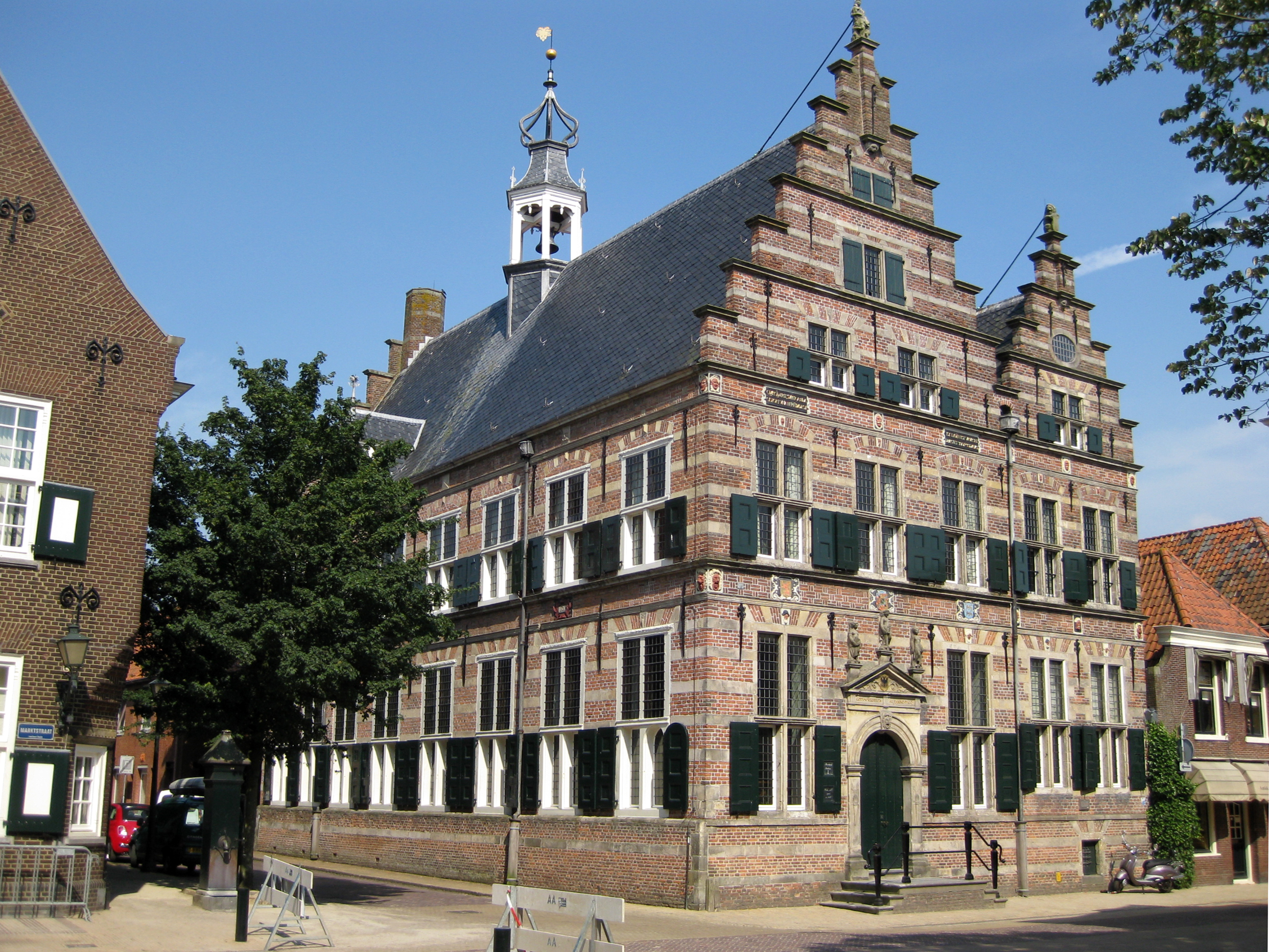 Naarden, Marktstraat 22, rijksmonument in Naarden-Vesting